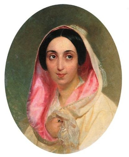 Портрет княгини Анны Александровны Багратион